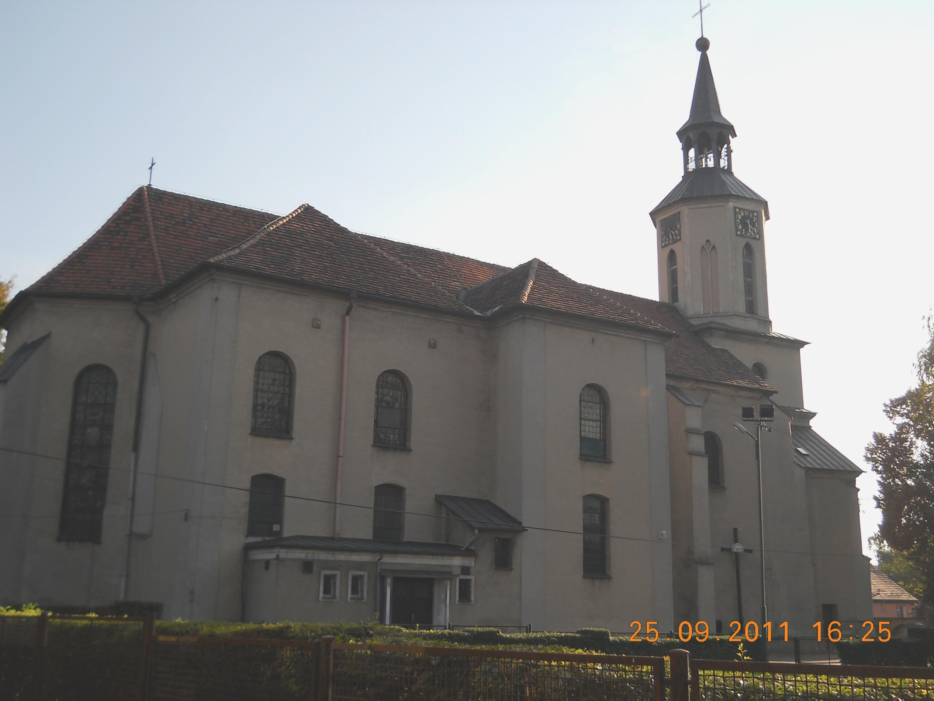 kościół par. p.w. św. Mikołaja Pyskowice, ul. Poniatowskiego